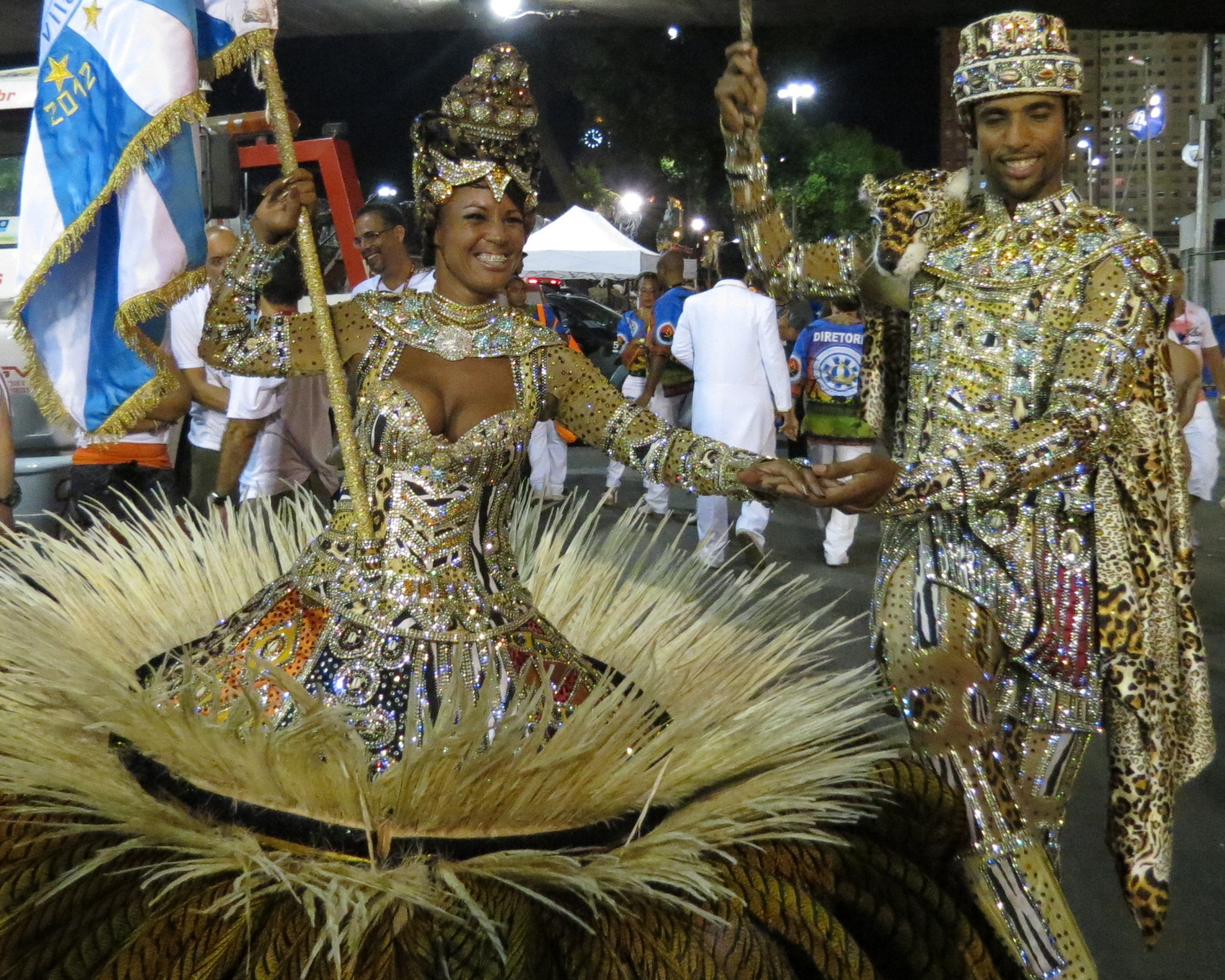 Unidos de Vila Isabel - Rio Carnaval 2012 15